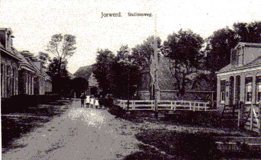 Ansichtkaart van rond 1910 uit verzameling Dolph Kohnstamm.